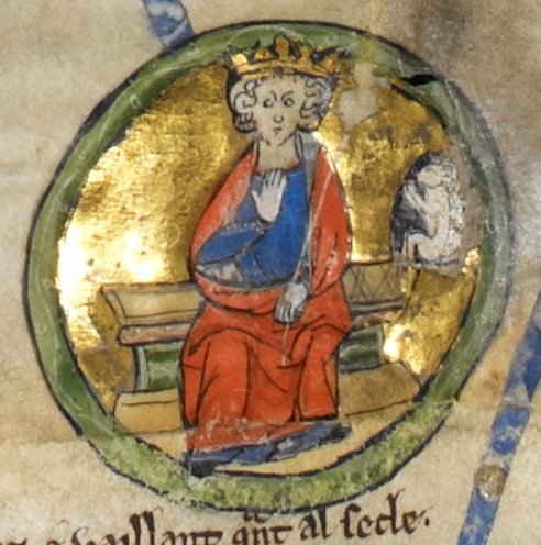 Miniature d'Æthelberht de Wessex dans une généalogie royale du XIIIe siècle.